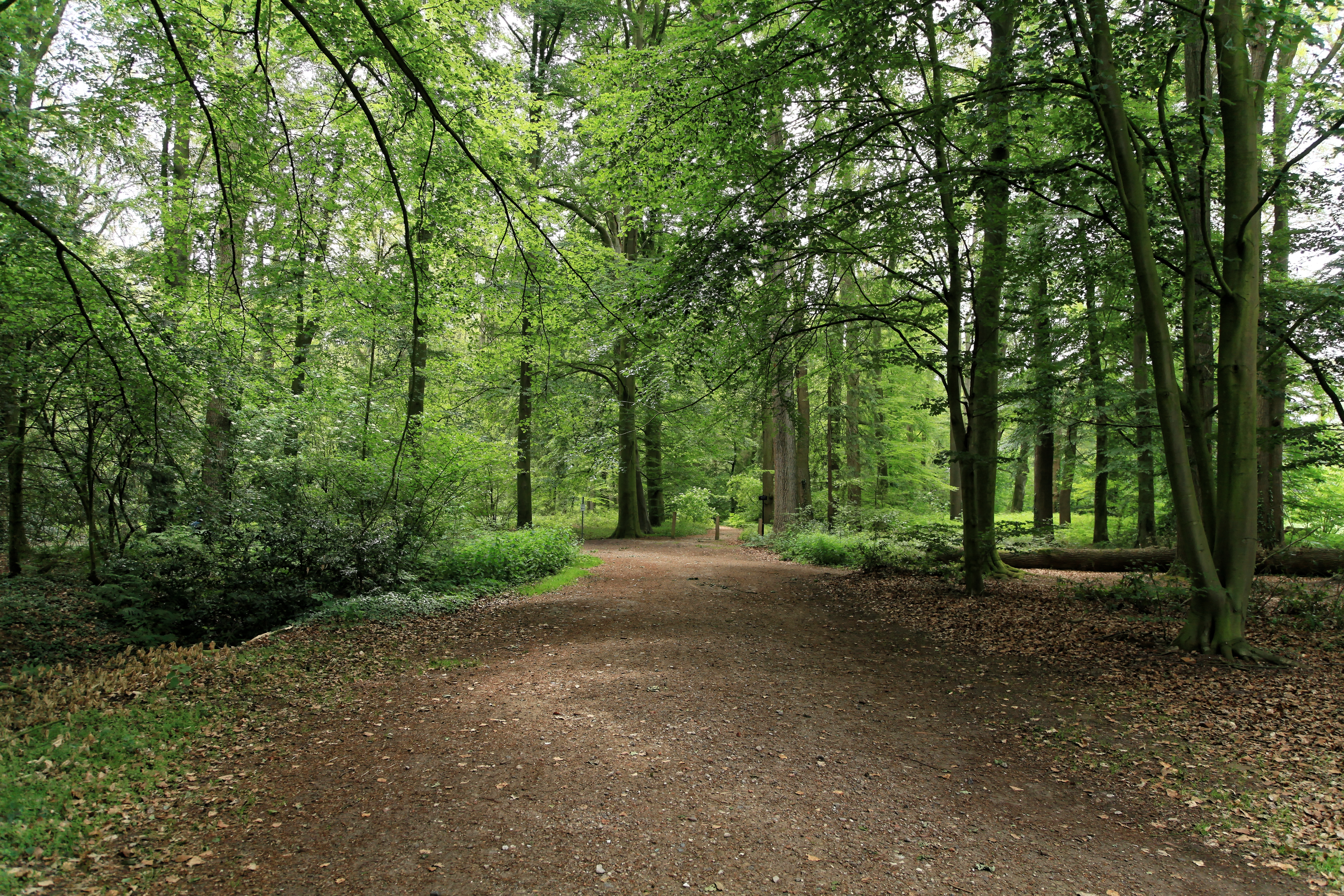 NSG Reiherkolonie Lage, Eichenallee in Lage (Dinkel)